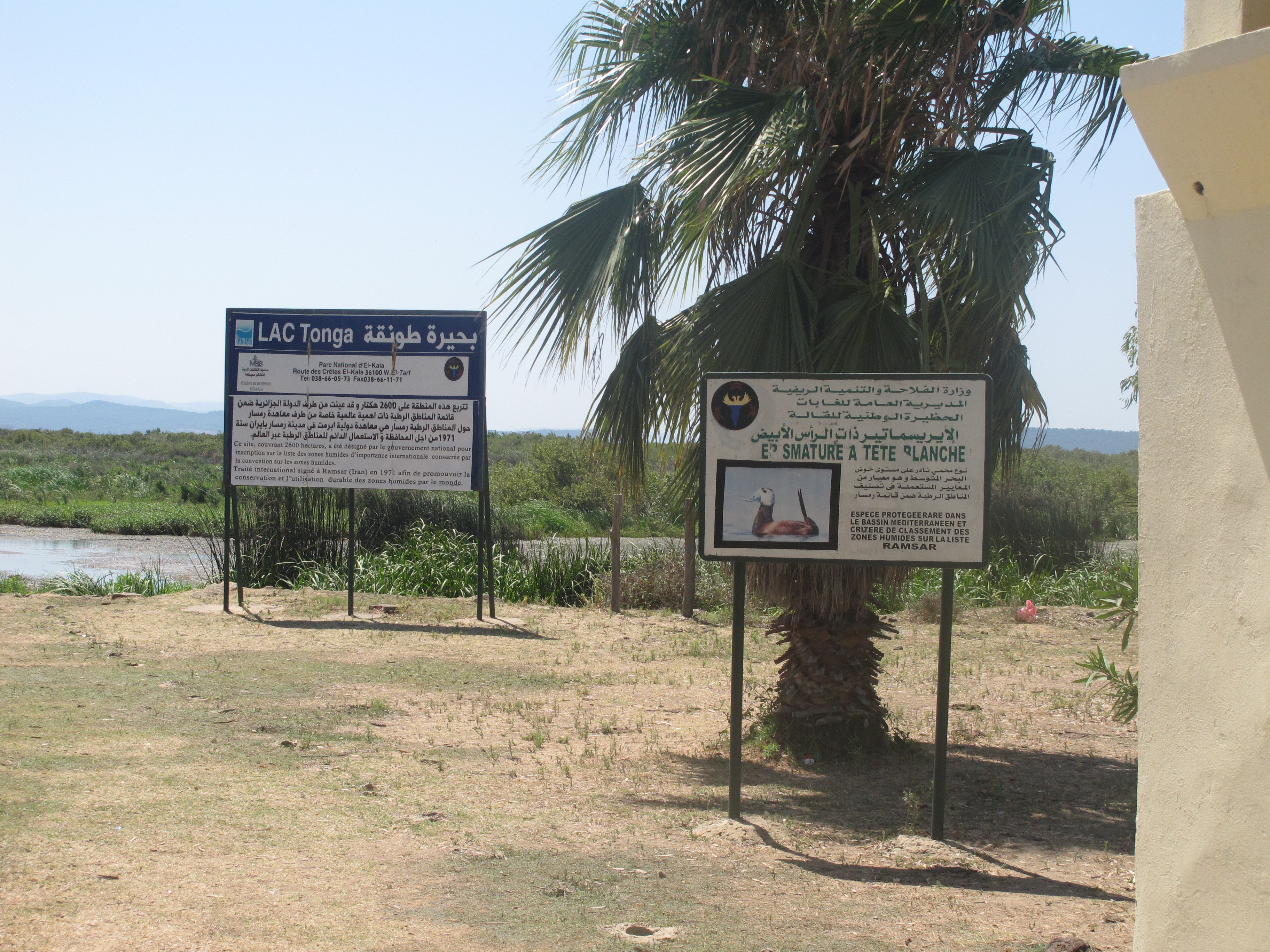 Plaque indicative sur la présence sédentaire de l'érismature à tête blanche au lac Tonga - parc national d'El Kala, Wilaya El Taref, Algérie - qui a été déterminante lors de l'inscription du parc à la liste des sites Ramsar.